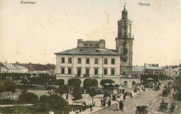 Sambor, Markt, image Marek Silarski Grafika:SamborRynek1901.jpg